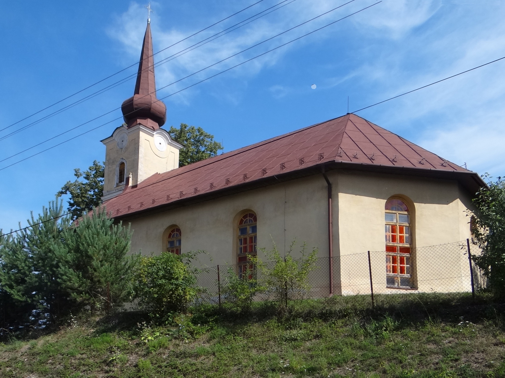 Sklabiňa